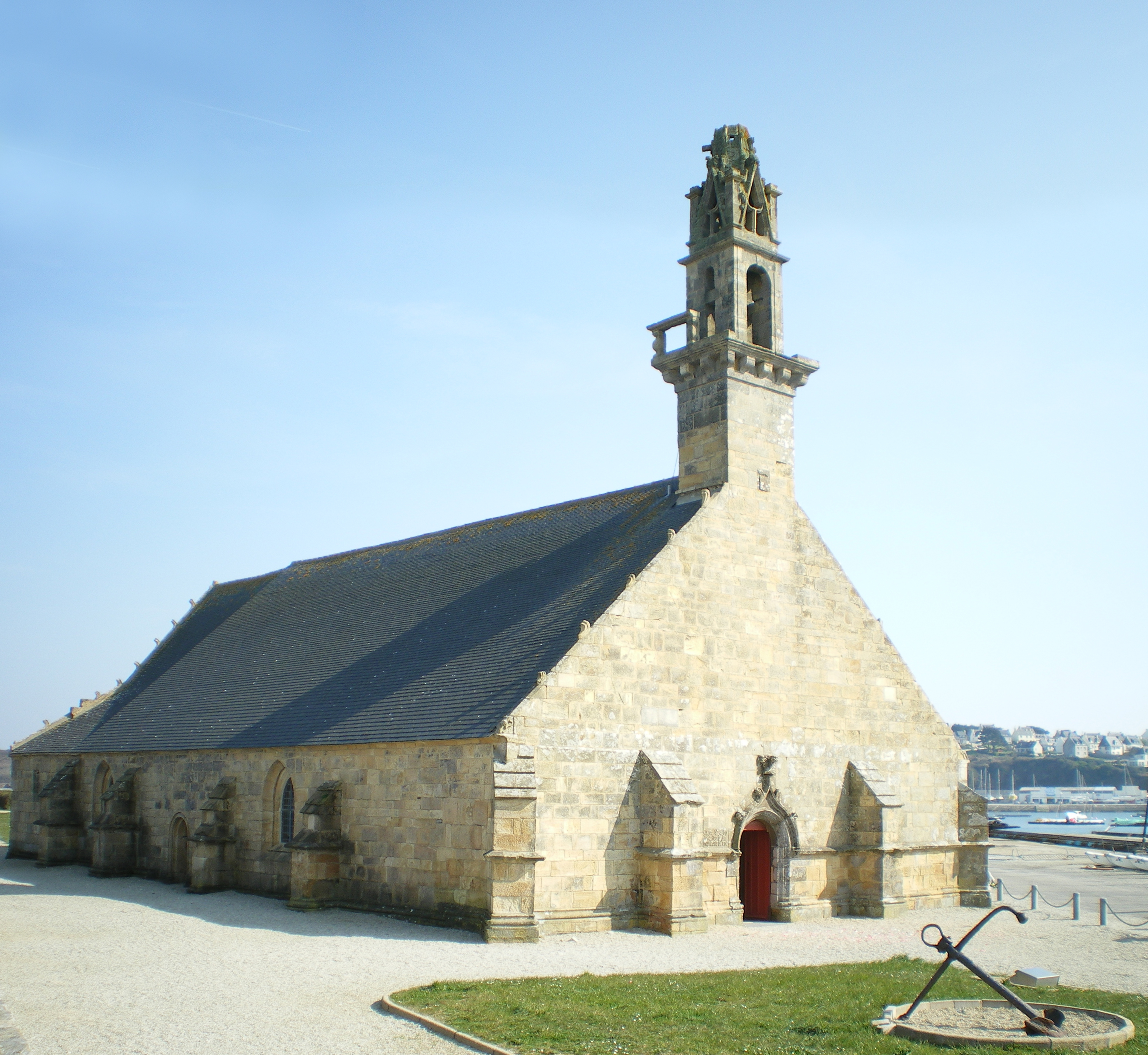 La chapelle Notre-Dame de Rocamadour à Camaret-sur-Mer, avec son clocher décapité par un obus de Marine anglais.